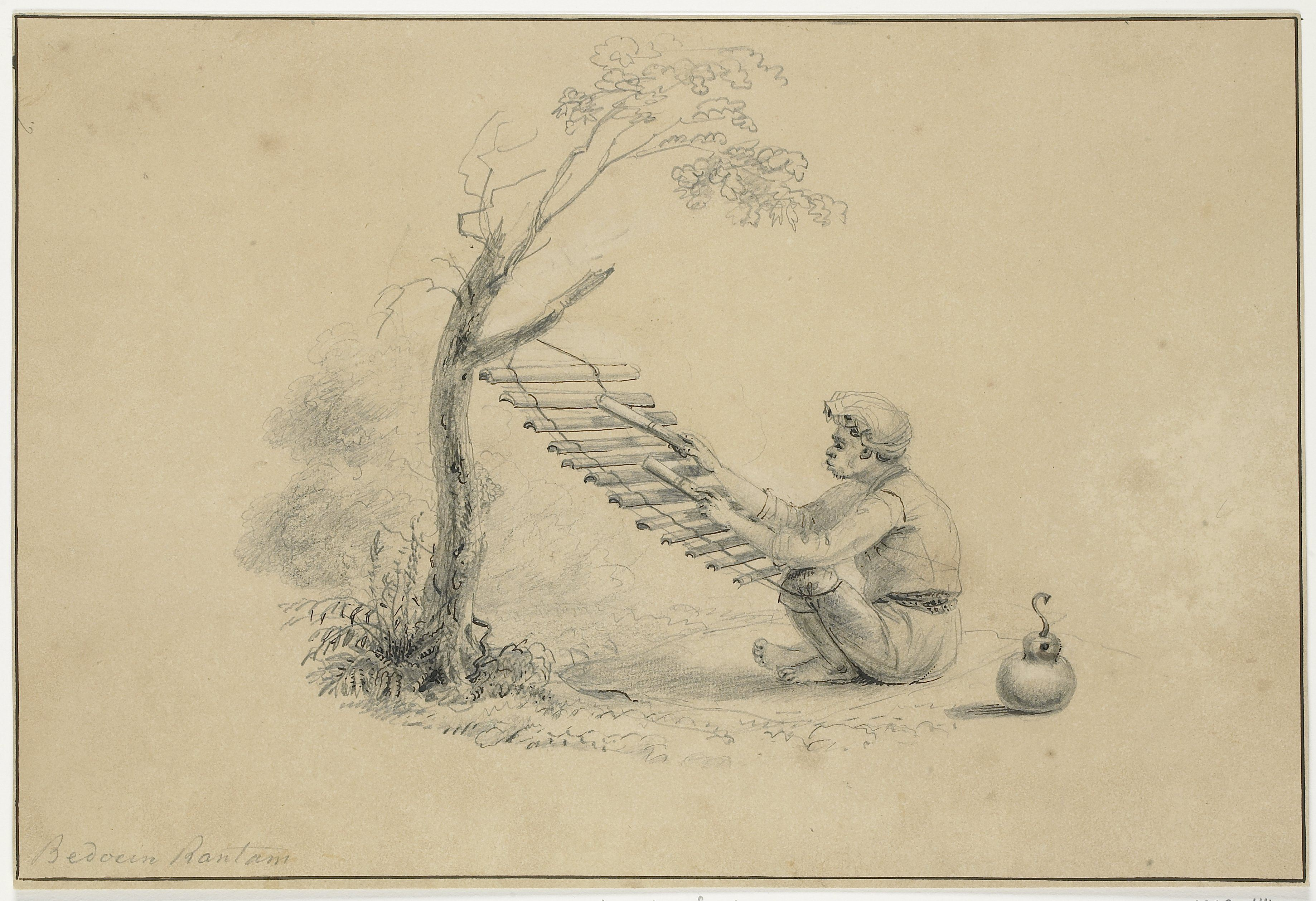 Baduy van de residentie Banten, een tjaloeng bespelend. De tjaloeng [calung] komt alleen in West-Java voor (de benaming is Soendanees). De Baduy wonen in het centraal bergachtig gedeelte van West-Java, gelegen ten westen van Bogor.